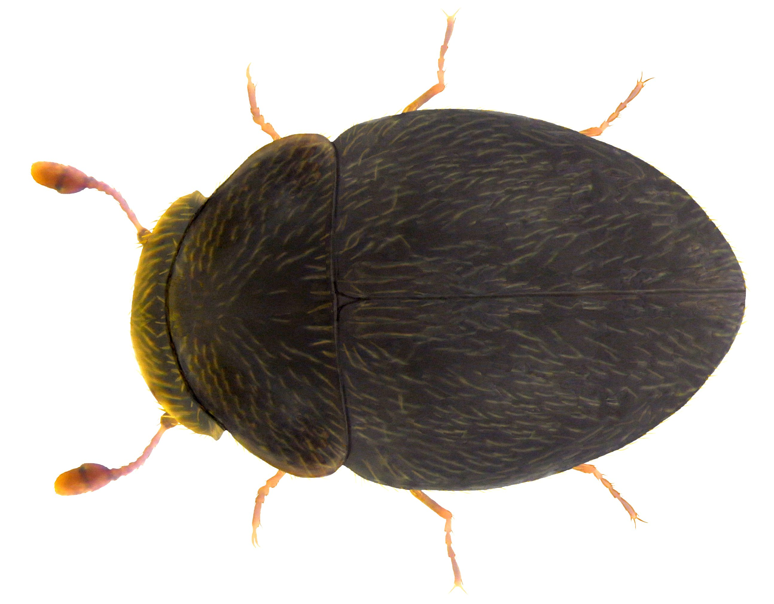 Clambus armadillo (DeGeer, 1774) Familie: Clambidae Groesse: 1-1,3 mm Verbreitung: Europa Ökologie: lebensweise unbekannt, unter faulendem Laub, im Hochwassergenist Fundort: Germania, Bayern, Oberfranken, Rudolphstein leg. A.Skale, 2003; det. U.Schmidt, 2007 Photo: U.Schmidt, 2010